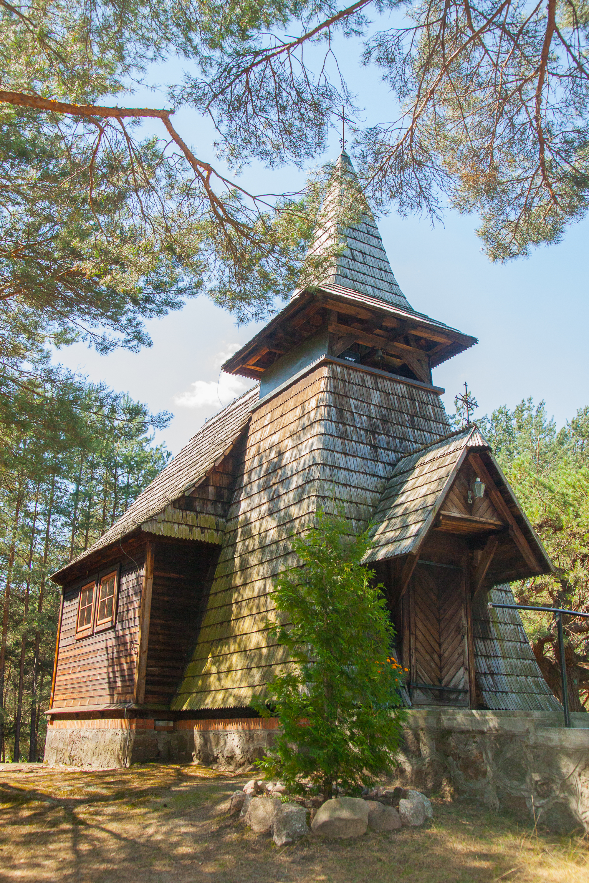 Radachówka, kaplica, 1936